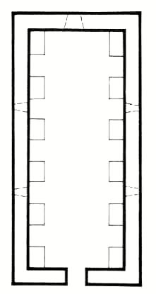 Mingəçevir Kilsə kompleksində bir nömrəli məbədin planı